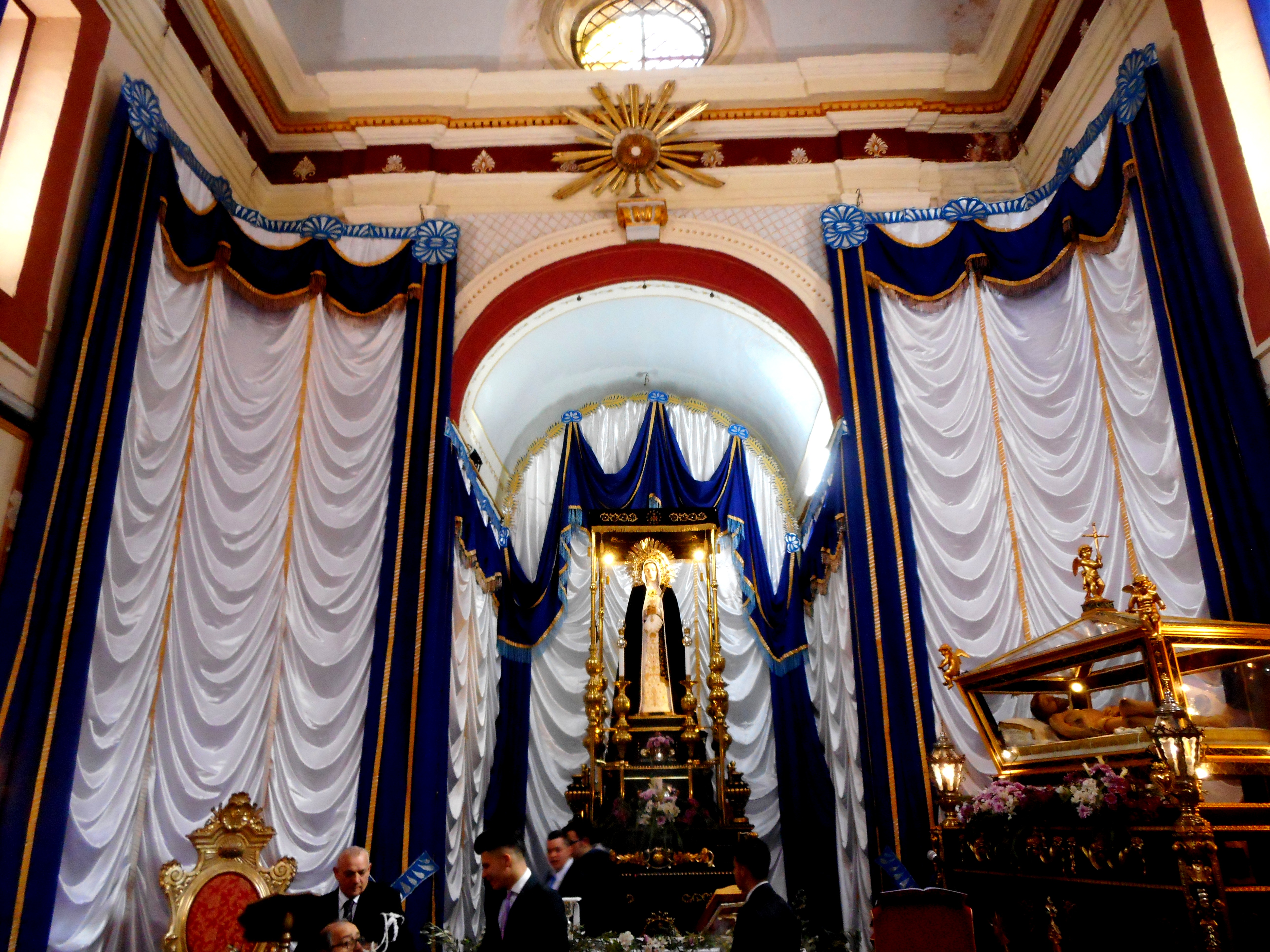 Interno della chiesa di San Giovanni alla Guilla addobbato per i riti del Venerdì Santo